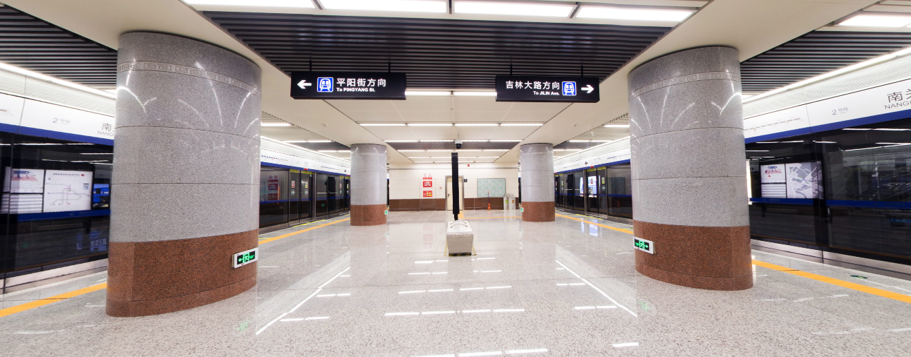 南关站站台